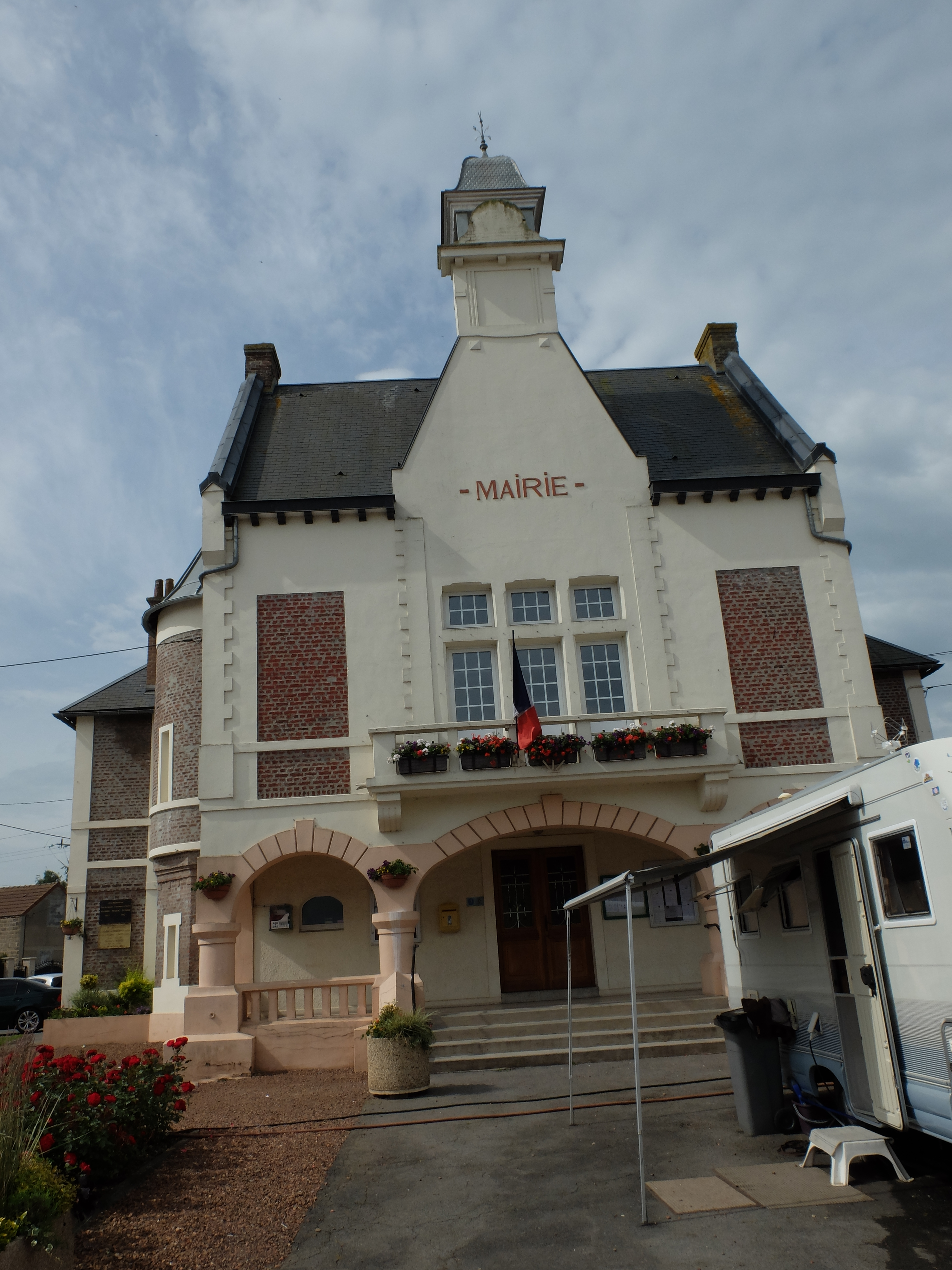 Vue de la mairie de Pelves.